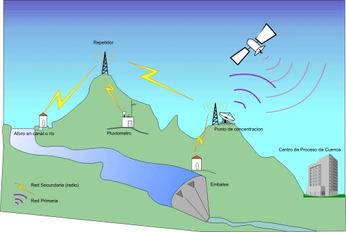 red de comunicaciones del SAIH Sistema Automatico Informacion Hidrologica